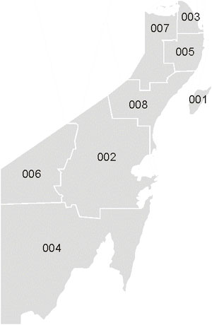 Mapa de los municipios del estado mexicano de Quintana Roo